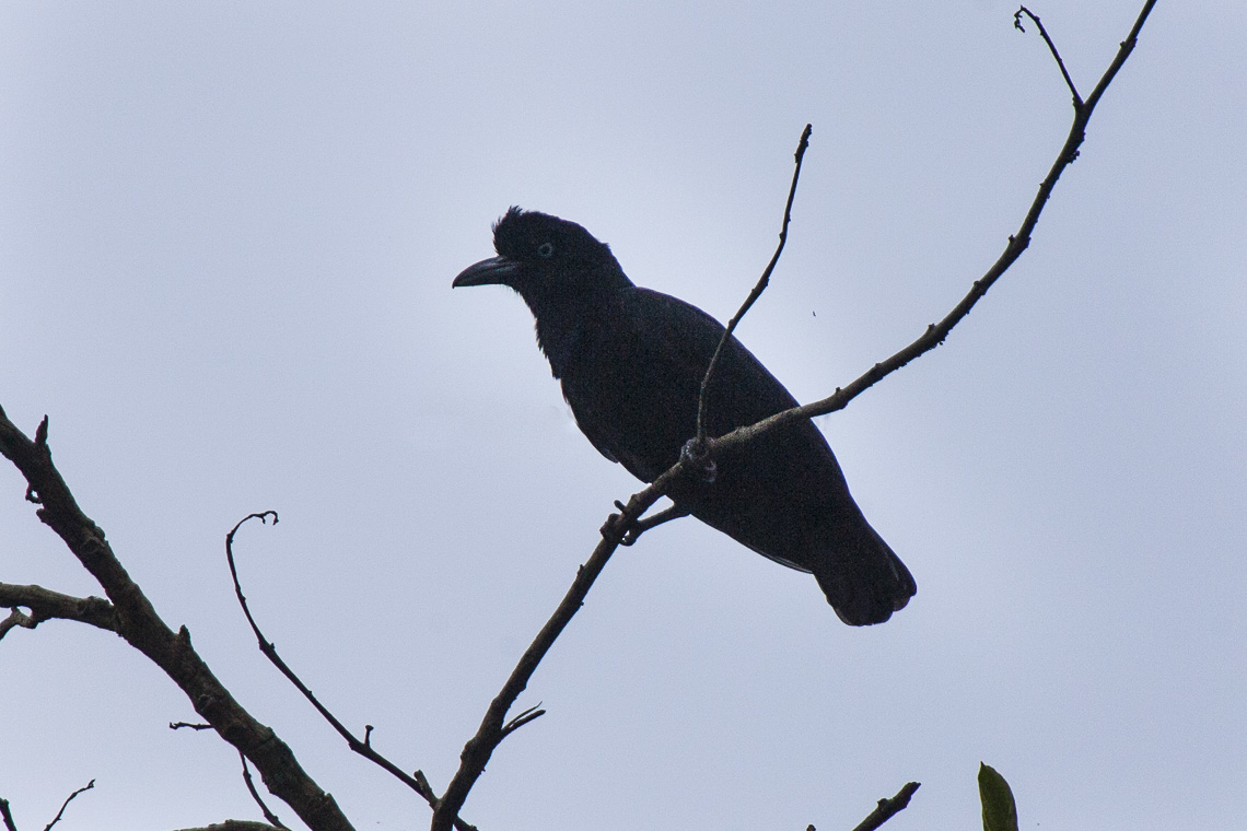 Amazonian Umbrellabird fem - Manu NP_8291